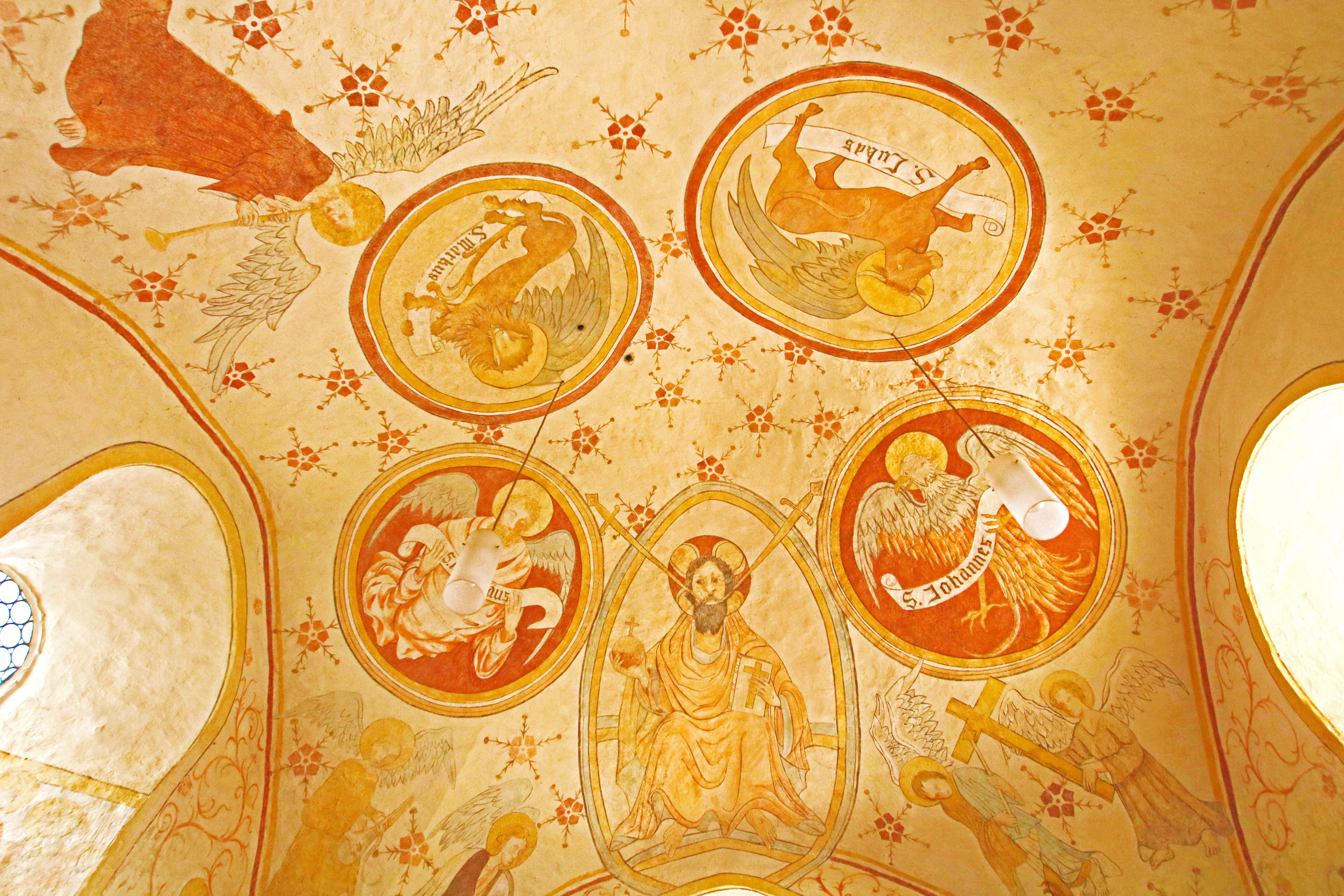 Evangelische Kirche Katzenfurt, Lahn-Dill-Kreis, Hessen, Deutschland